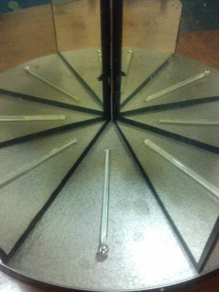 Foto tirada nos laboratórios de Física da UFRGS